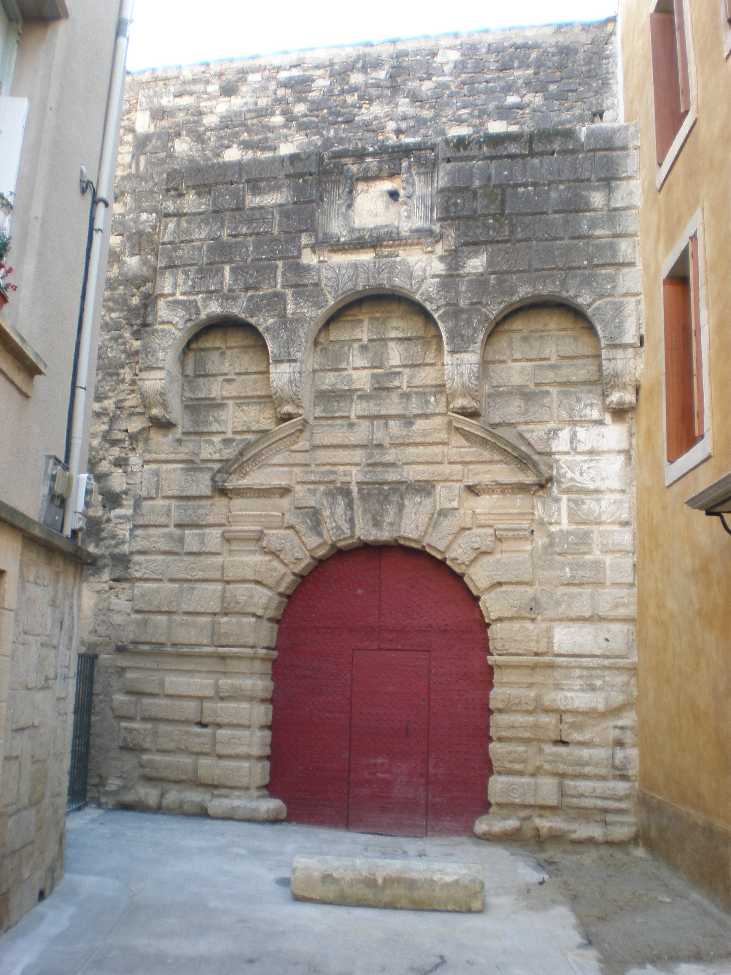 Vieille porte à Lavérune (Hérault)